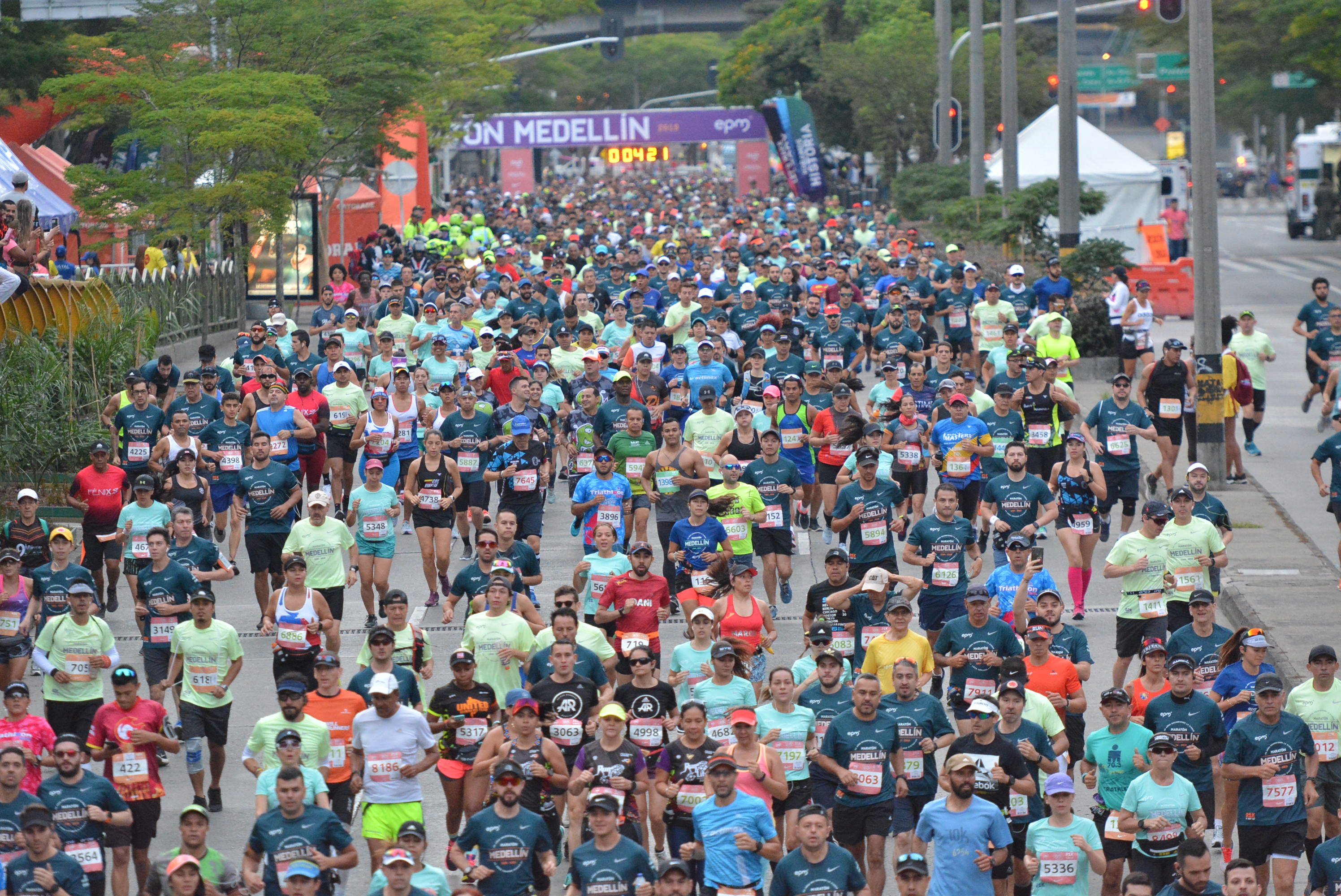 Imagen de la partida de la Maratón Medellín 2019, el 8 de septiembre.